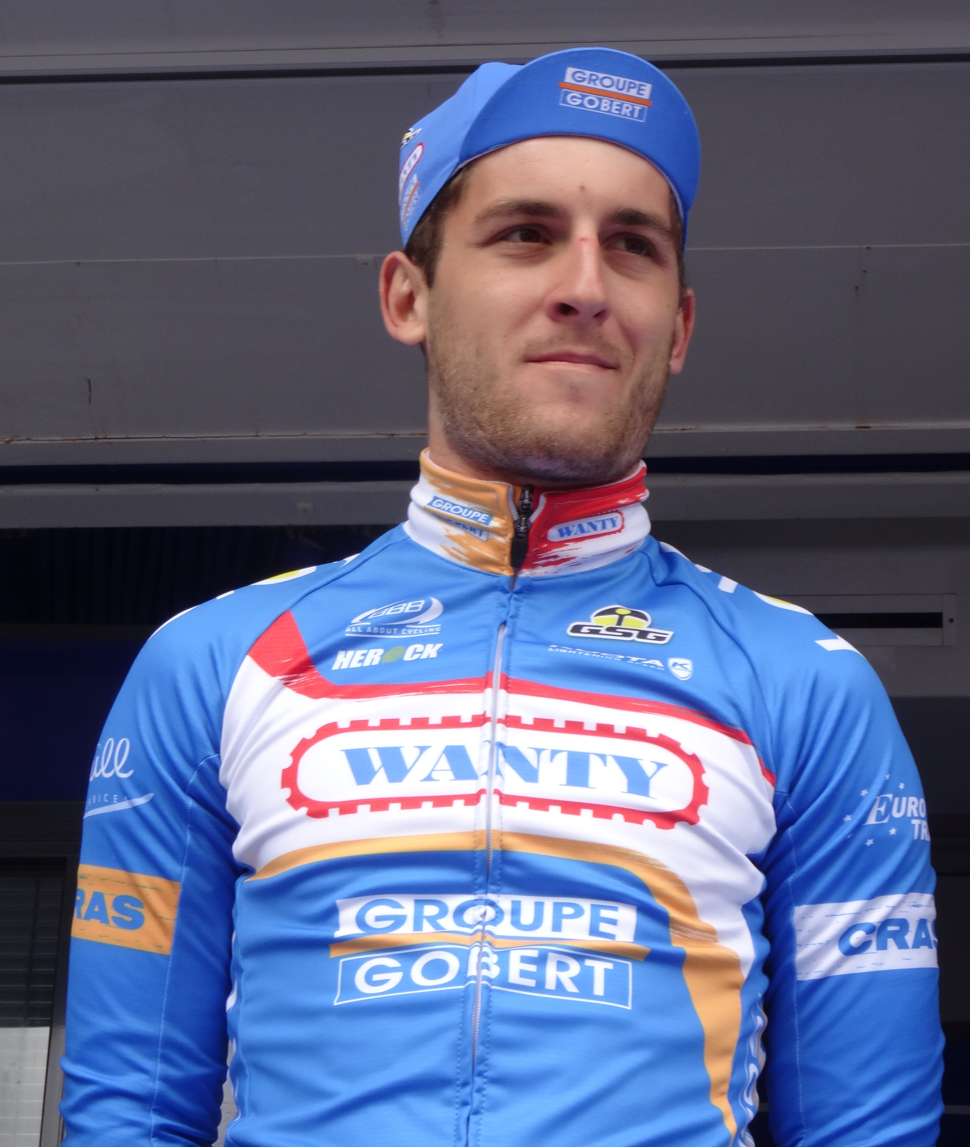 Reportage photographique réalisé le mercredi 7 mai 2014 au départ de la première étape de l'édition 2014 des Quatre jours de Dunkerque à Dunkerque, Nord, Nord-Pas-de-Calais, France. Depicted person: Tim De Troyer Depicted team: Wanty-Groupe Gobert